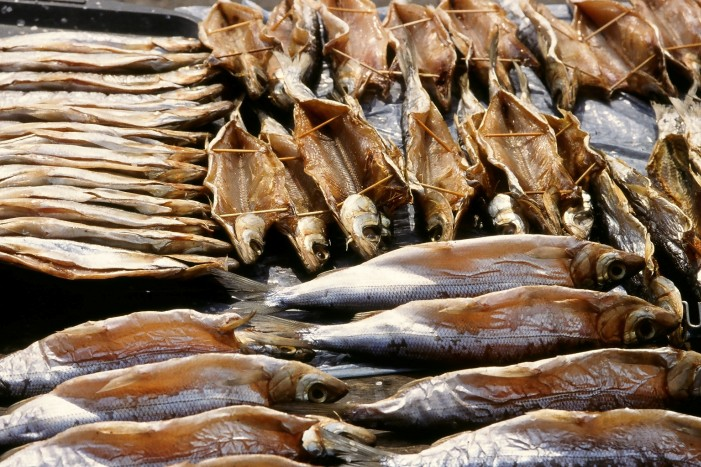 Omul fish, endemic to Lake Baikal (Russia). Smoked and on sale at Listvyanka market.